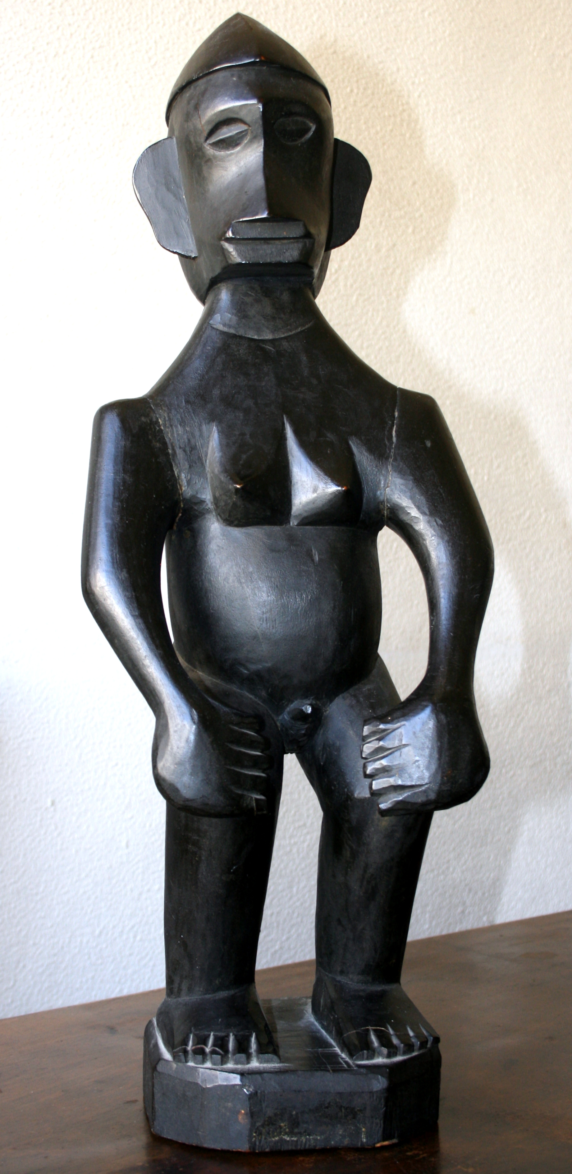 Bulol de Ifugao en madera negra, siglo XIX o anterior.